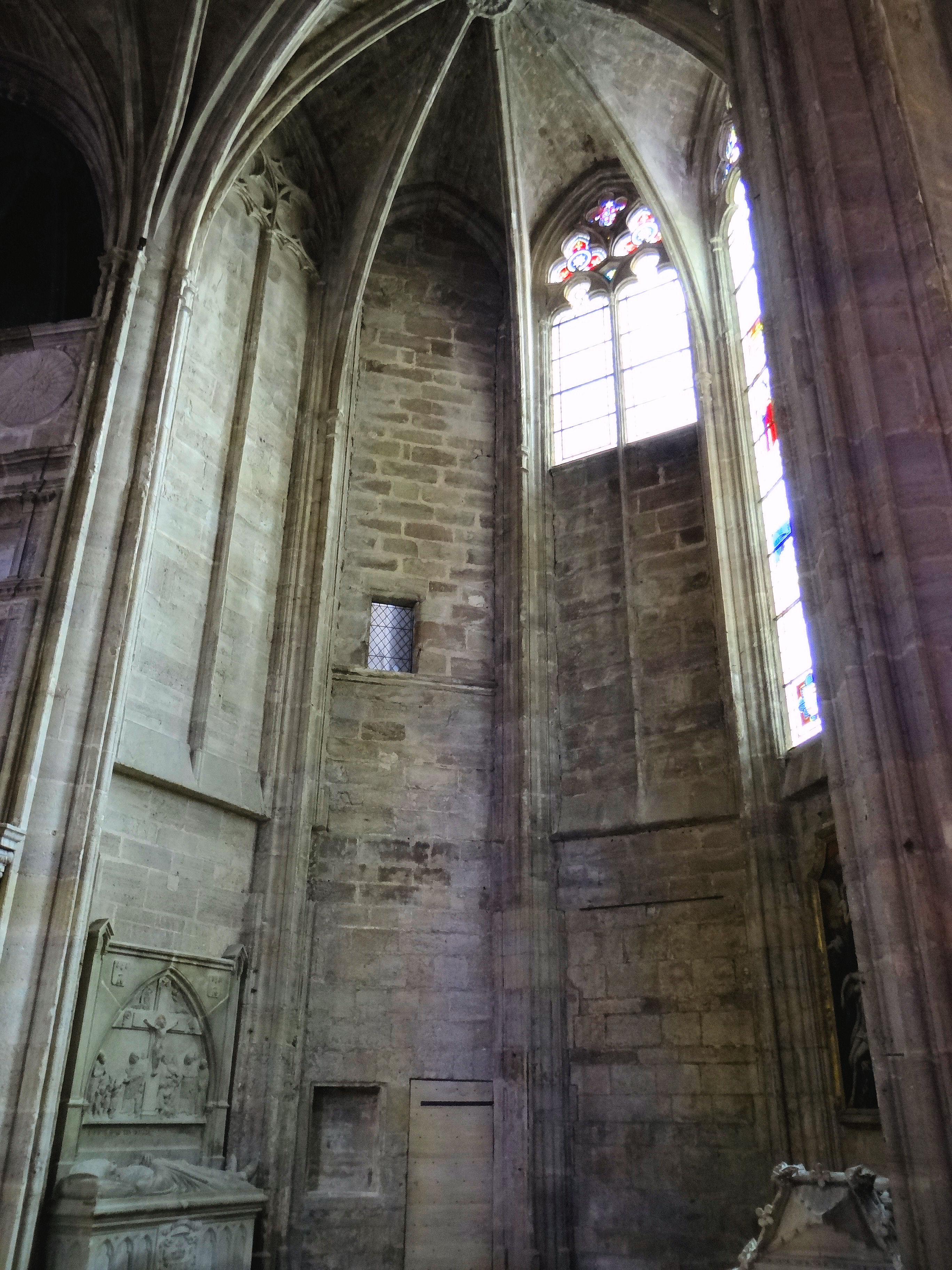 Rodez - Cathédrale Notre-Dame - Chapelle rayonnante polygonale du choeur